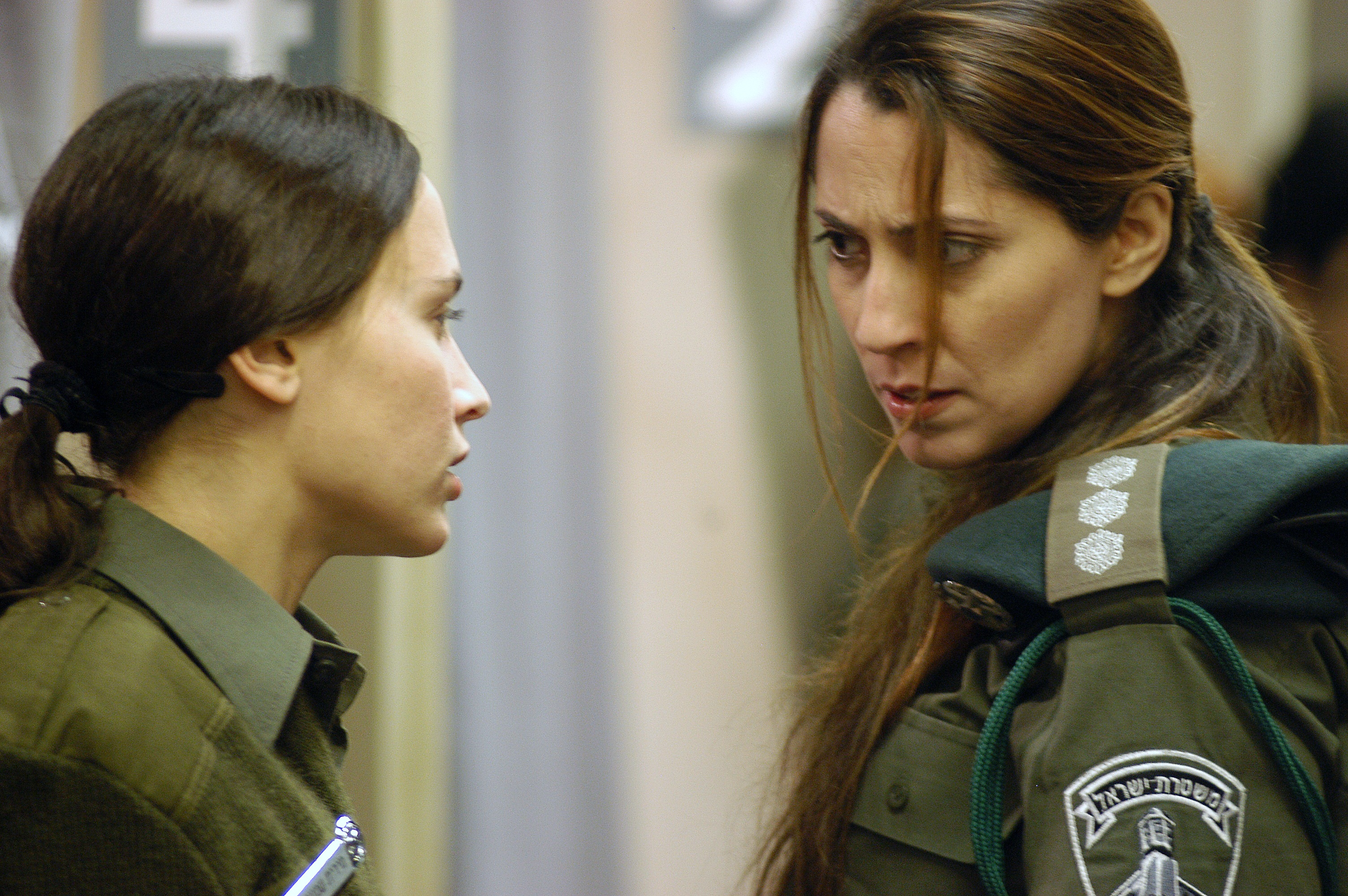 אירית סוקי (מימין) ונעמה שנדר (משמאל), בסרטן של וידי בילו, דליה הגר "קרוב לבית", 2005